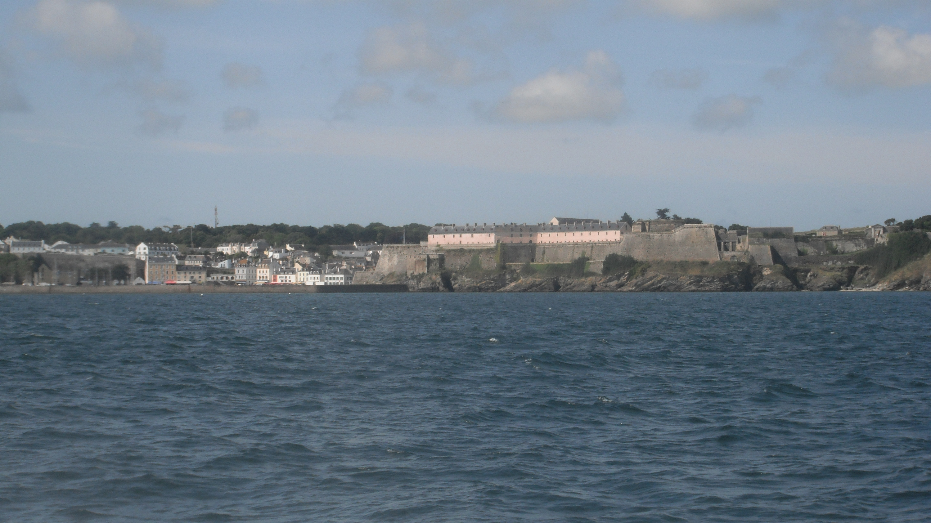 Le Palais (Belle-Île-en-Mer, Morbihan, France) vue depuis la mer, avant-port et citadelle Vauban, juillet 2011.